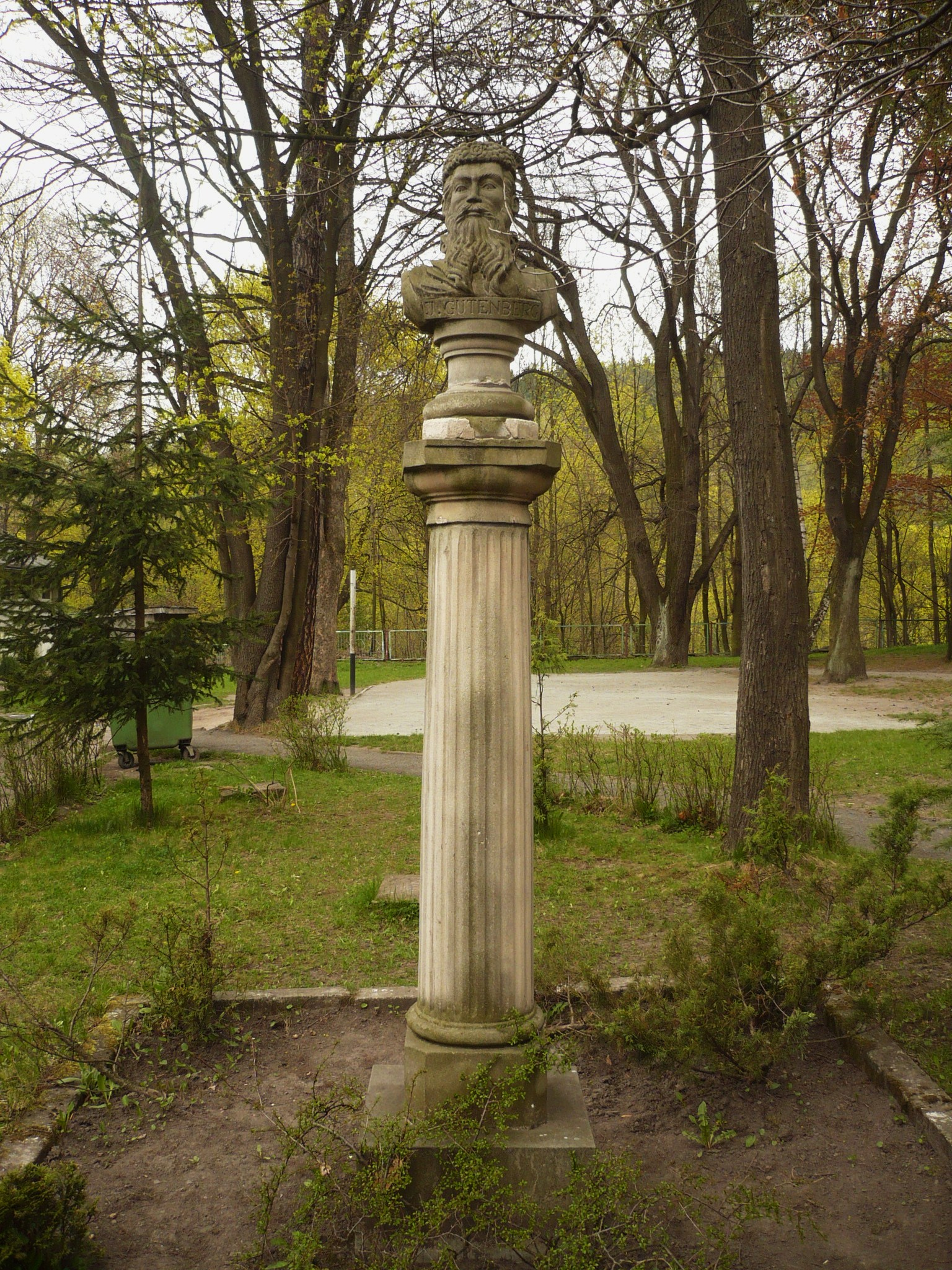 Pomnik Gutenberga